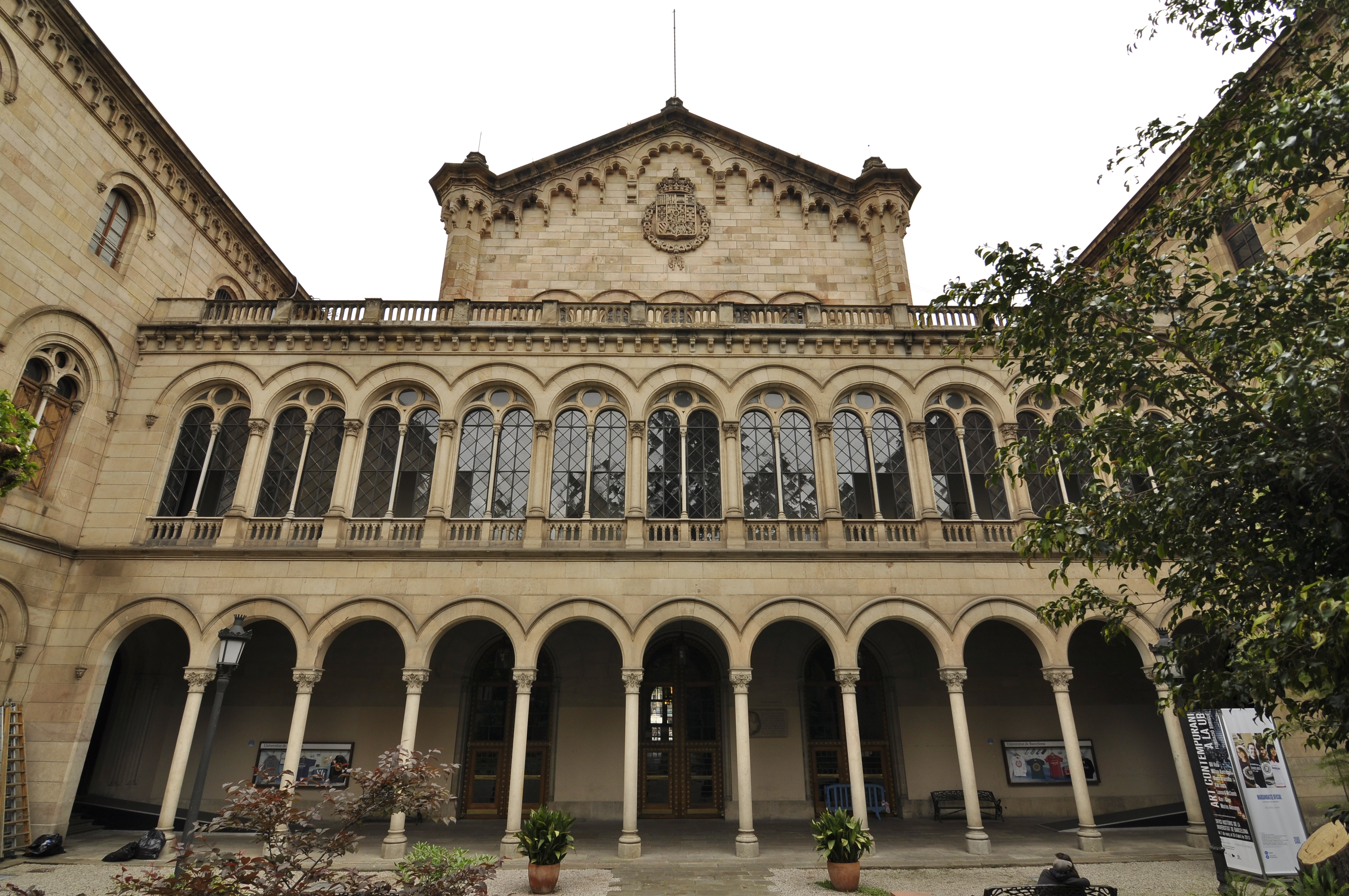 rerere